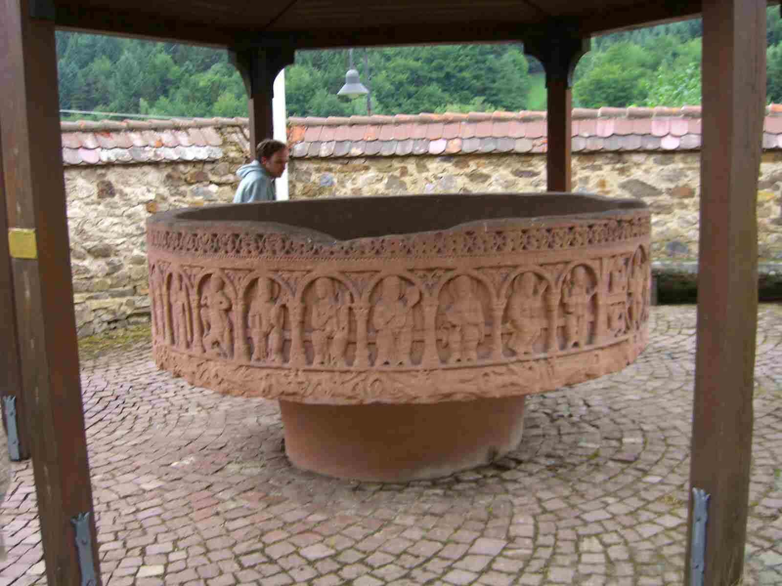 Die mächtige so genannte Taufbrunnenschale vor St. Ulrich (Schwarzwald)